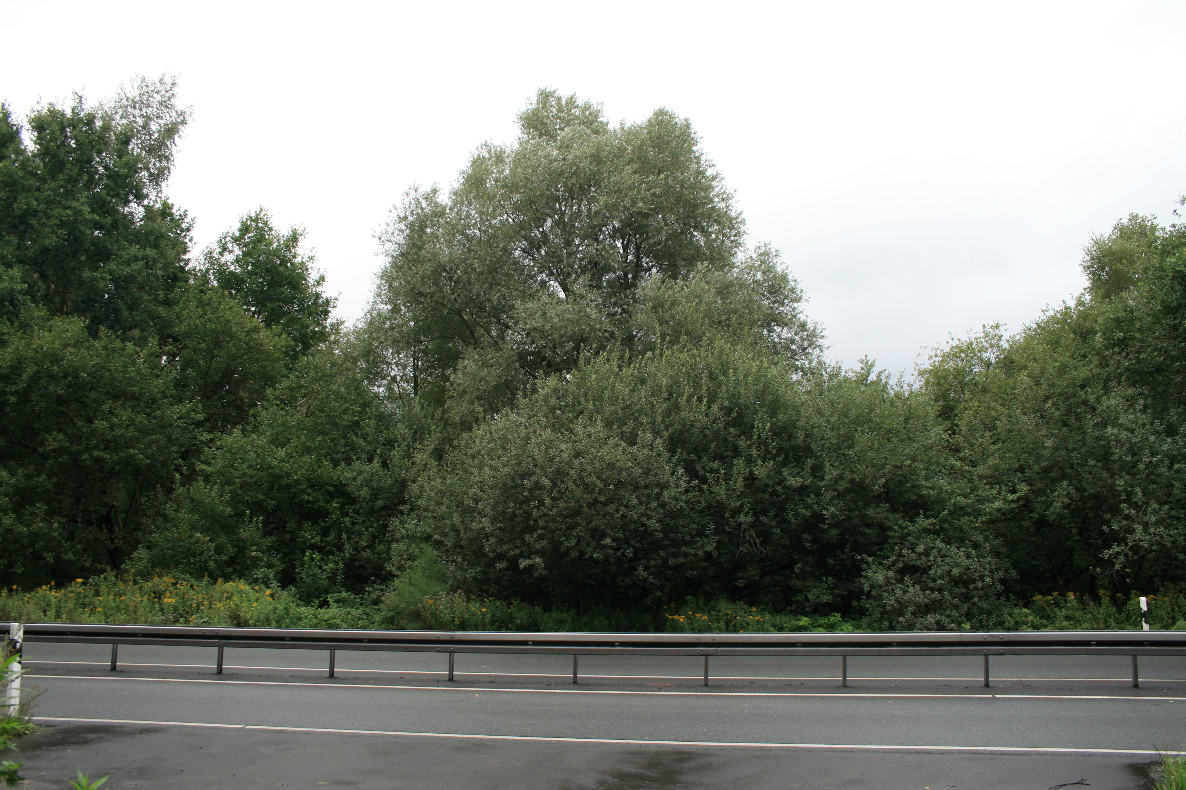 Der südliche Rand des Naturschutzgebietes grenzt unmittelbar an die Hülsbergstraße in Marl. Das Foto wurde südlich der vorgenannten Straße, zwischen der Autobahn 52 im Westen und der Bahnlinie Haltern-Marl im Osten, mit Blickrichtung Norden aufgenommen.